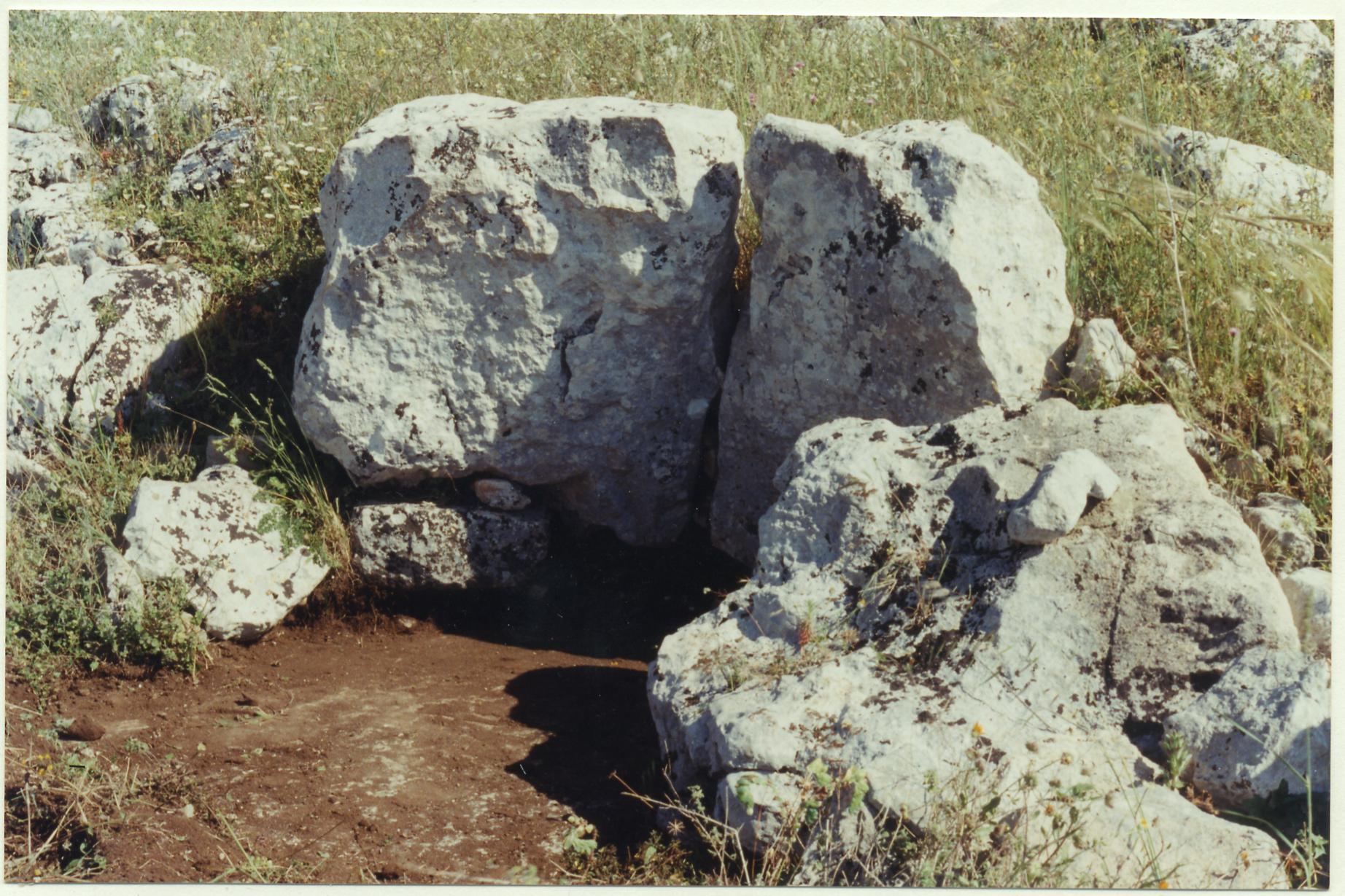 Autore: Salvatore Piccolo Fonte: dello stesso autore Descrizione: Dolmen situato a Cava Lazzaro (Sicilia)